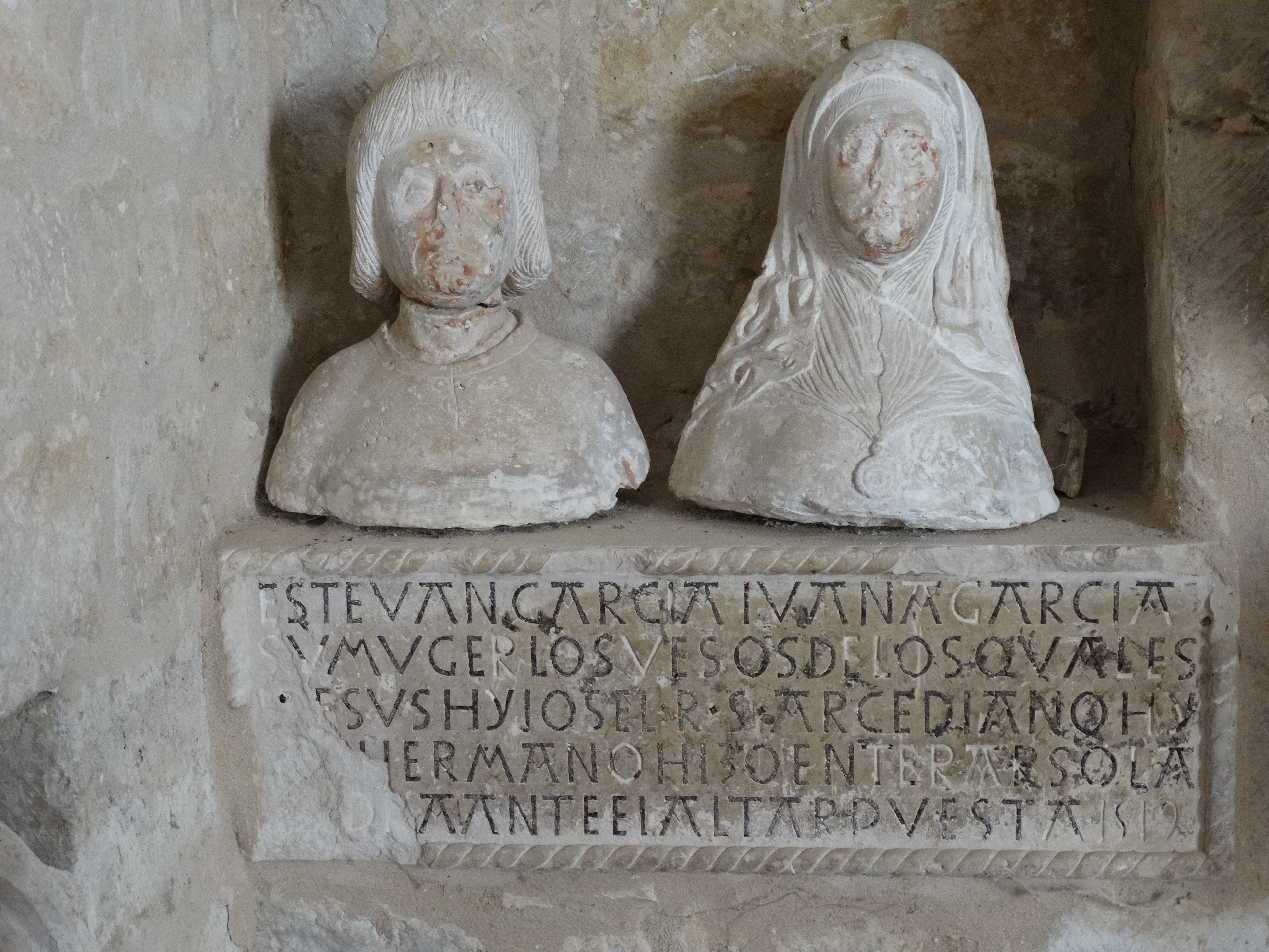 Torremormojón, provincia de Palencia, España. Iglesia de Santa María del Castillo. Capilla enterramiento de los Castro y los Velasco. Dos bustos del enterramiento de los padres del Arcediano Ubaldes.